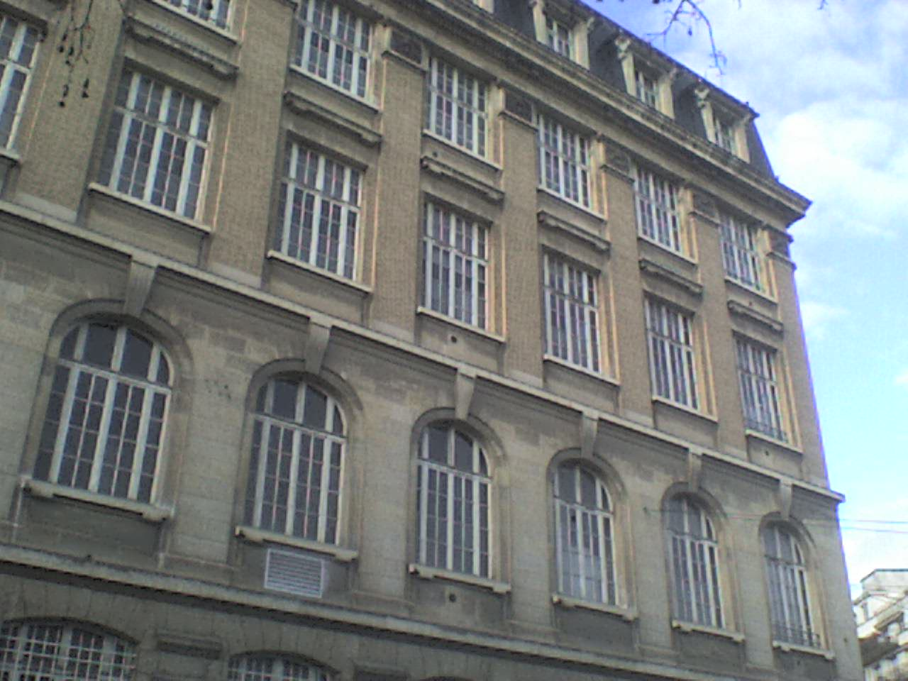 Façade du bloc scientifique du lycée Gay-Lussac de Limoges (Haute-Vienne, France)